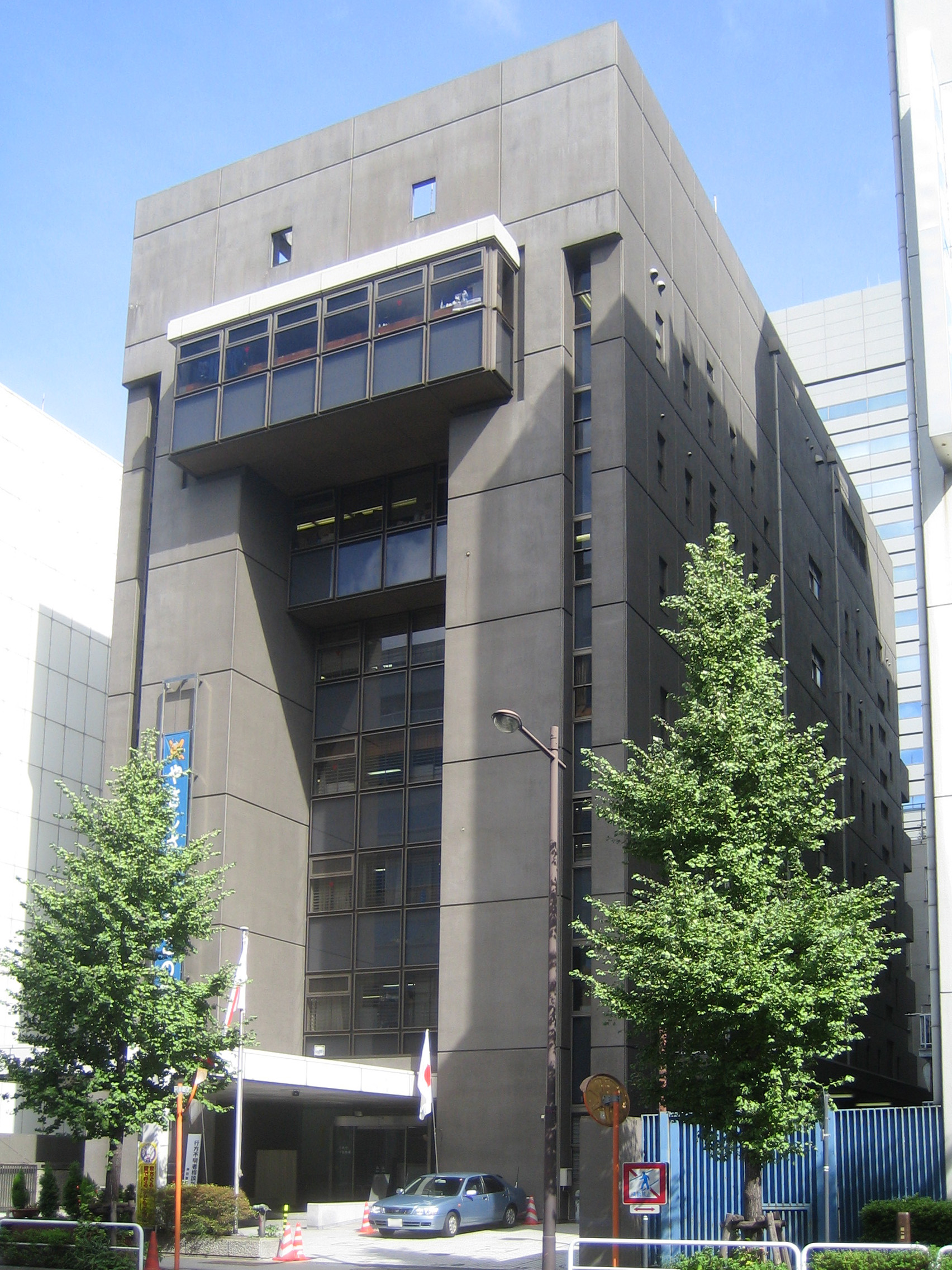 神田警察署。東京都千代田区神田錦町 Kanda Police Station (神田警察署 Kanda Keisatsusho), at KandaNishikicho, Chiyoda, Tokyo, Japan